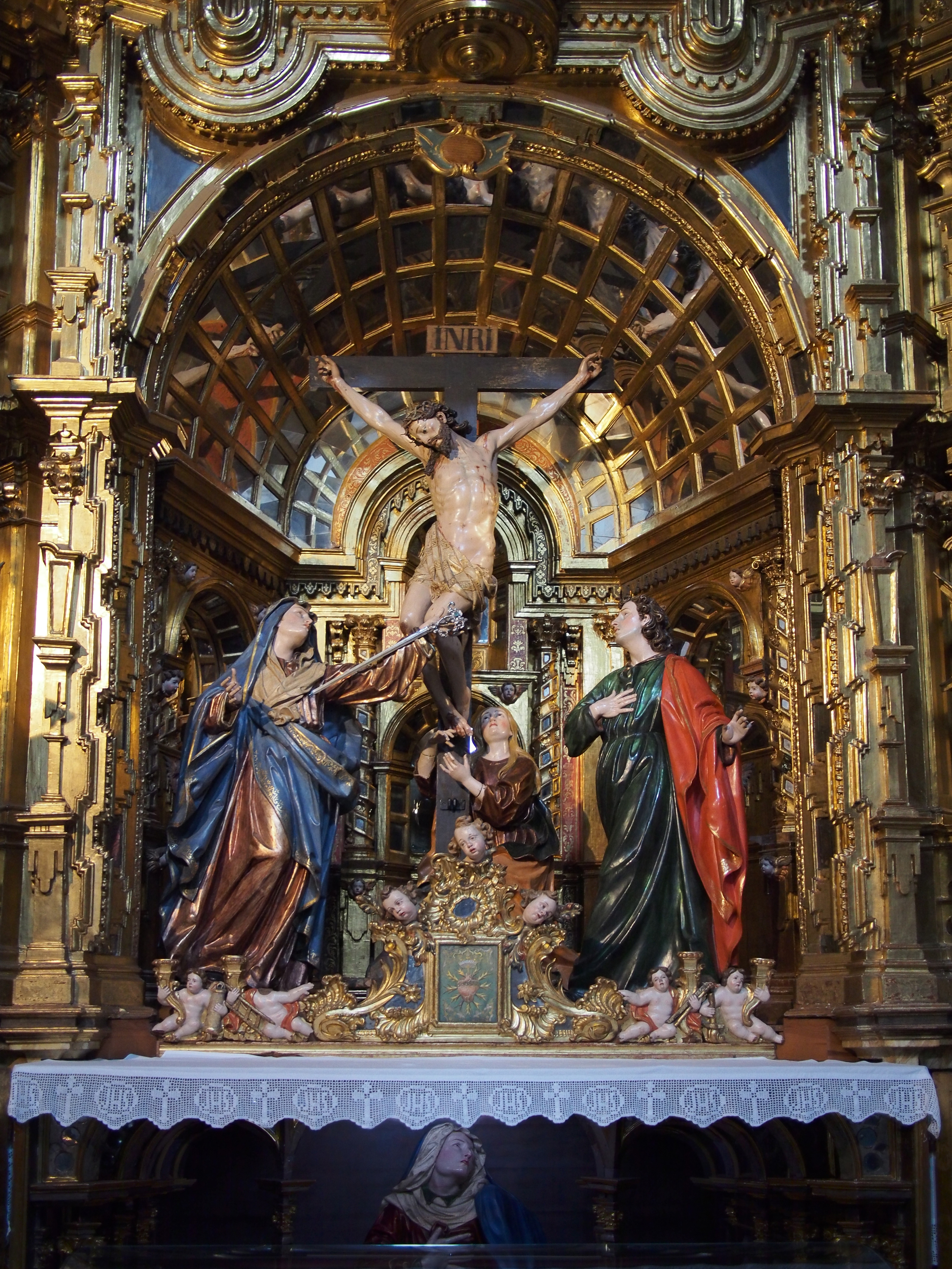 Retablo de la Buena Muerte. Iglesia de San Miguel y San Julián, Valladolid. Calvario de Pedro de Sierra.